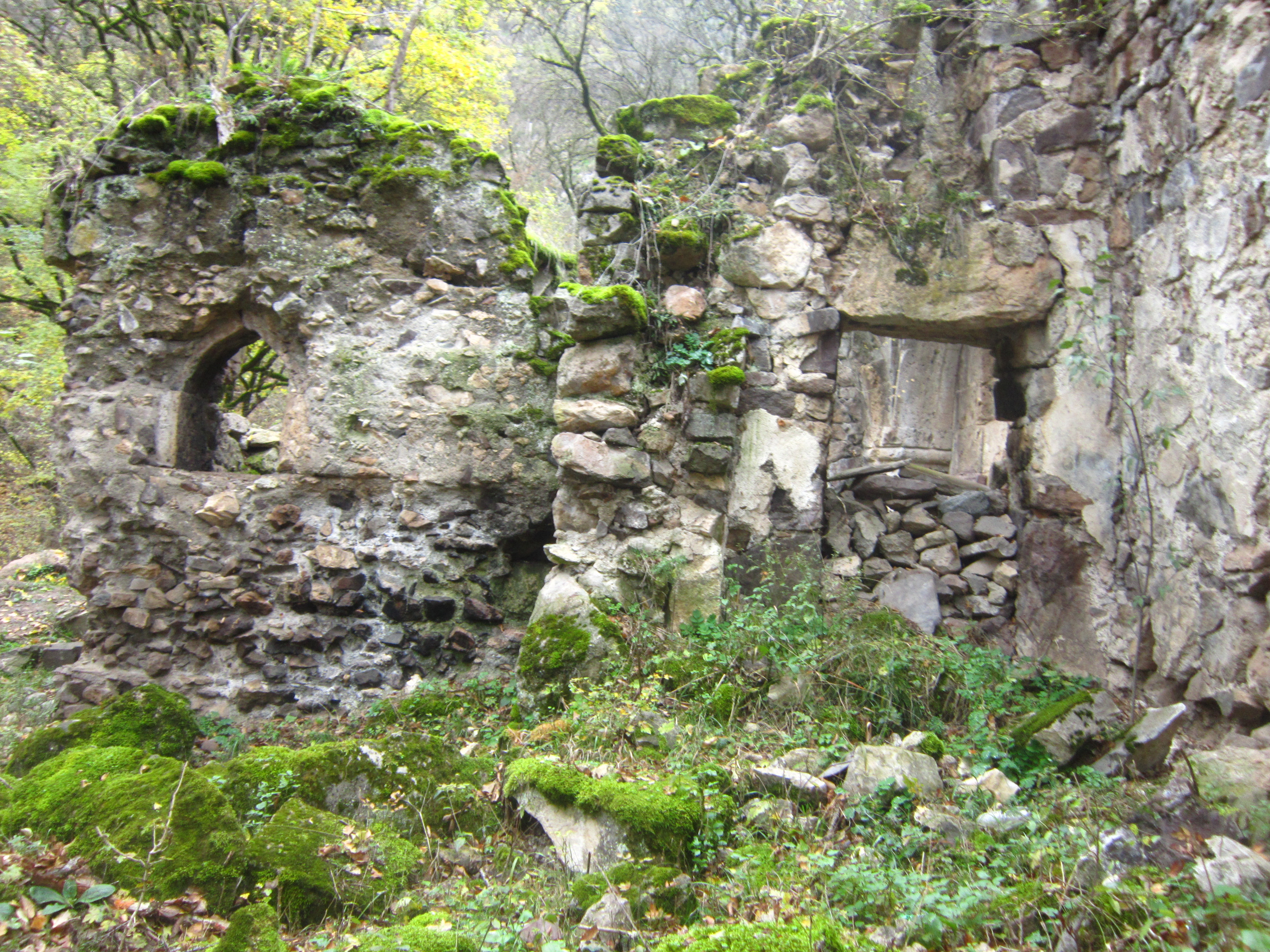 Վանական համալիր Շխմուրադ 38/16